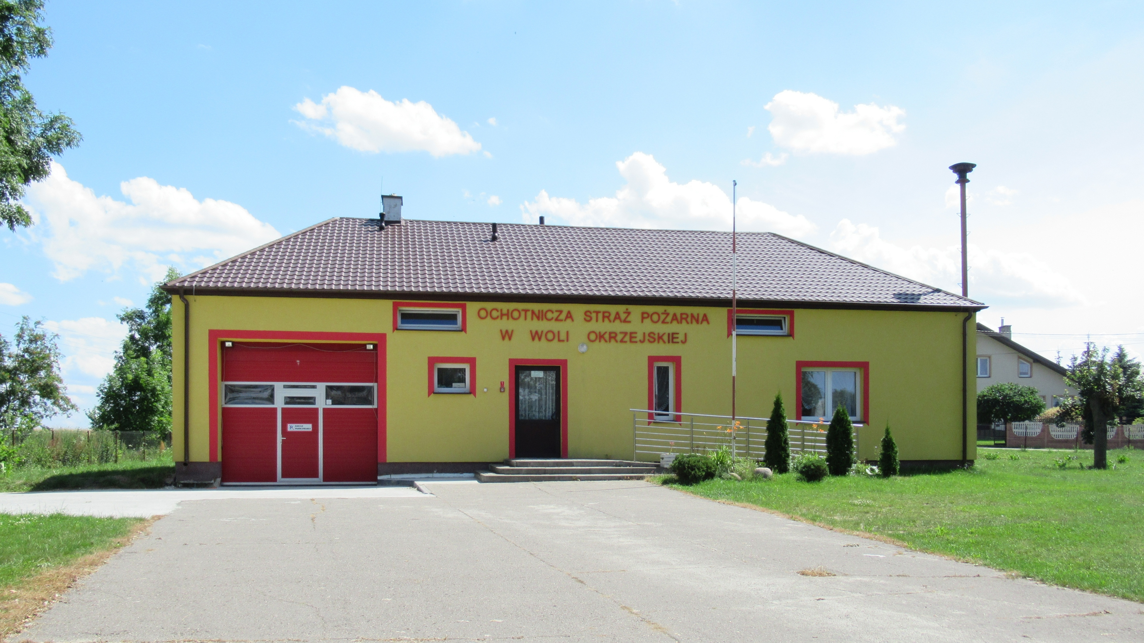 Wola Okrzejska (pow. łukowski, woj. lubelskie, Polska) — remiza Ochotniczej Straży Pożarnej.